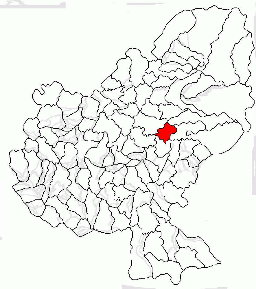 Categorie:Hărţi ale judeţului Mureş